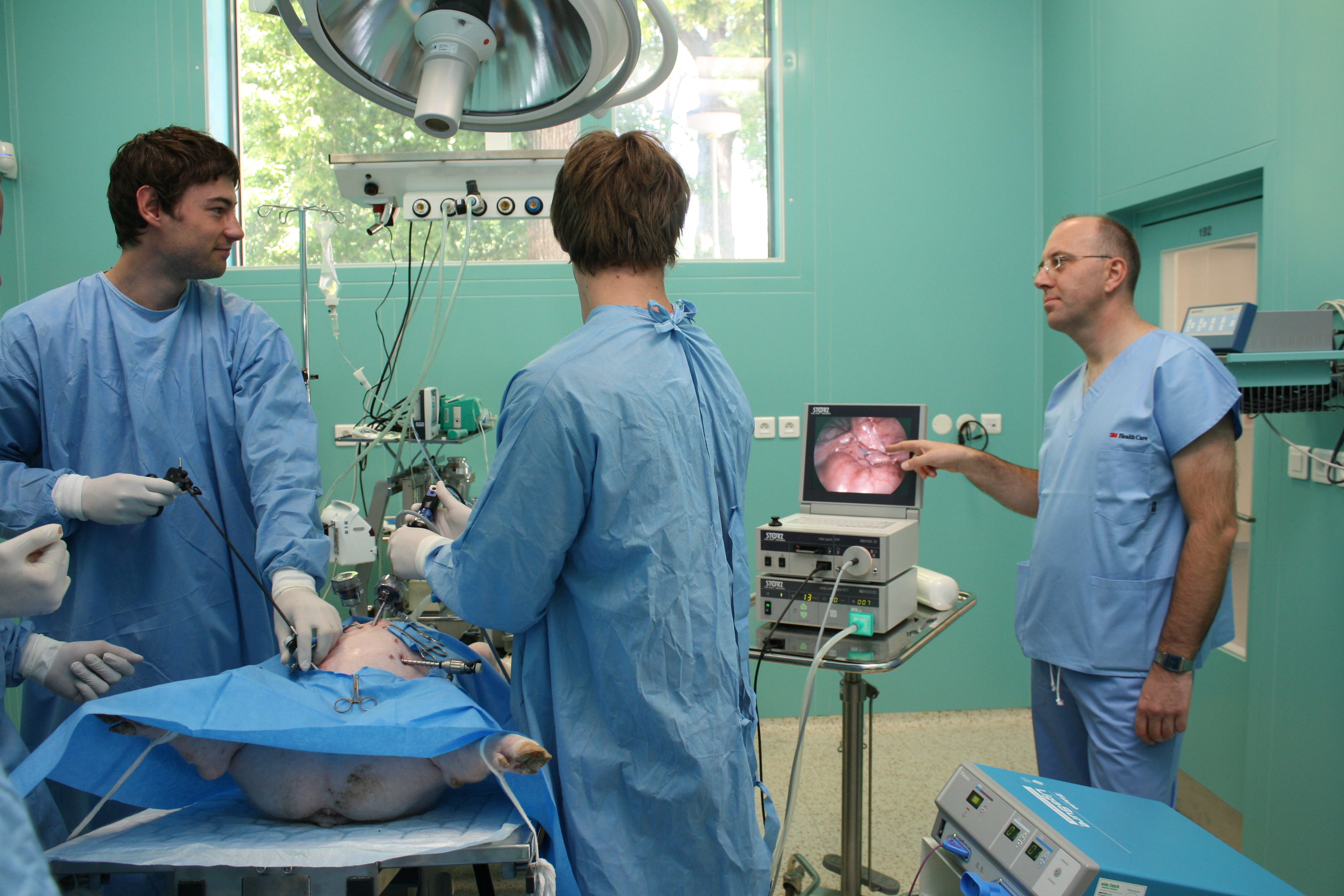 Endoskopie